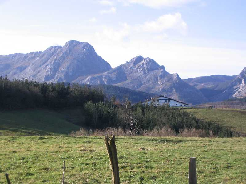 Montaña Aitz Txiki Abadiano, Vizcaya, País Vasco, España.